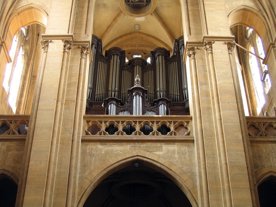 buffet d'orgues, église Saint-Georges de Fumay (08)